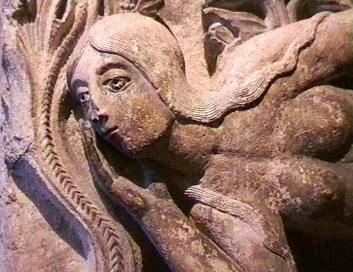 Autun, Musée Rolin, Gislebertus, Liegende Eva (aus Video)